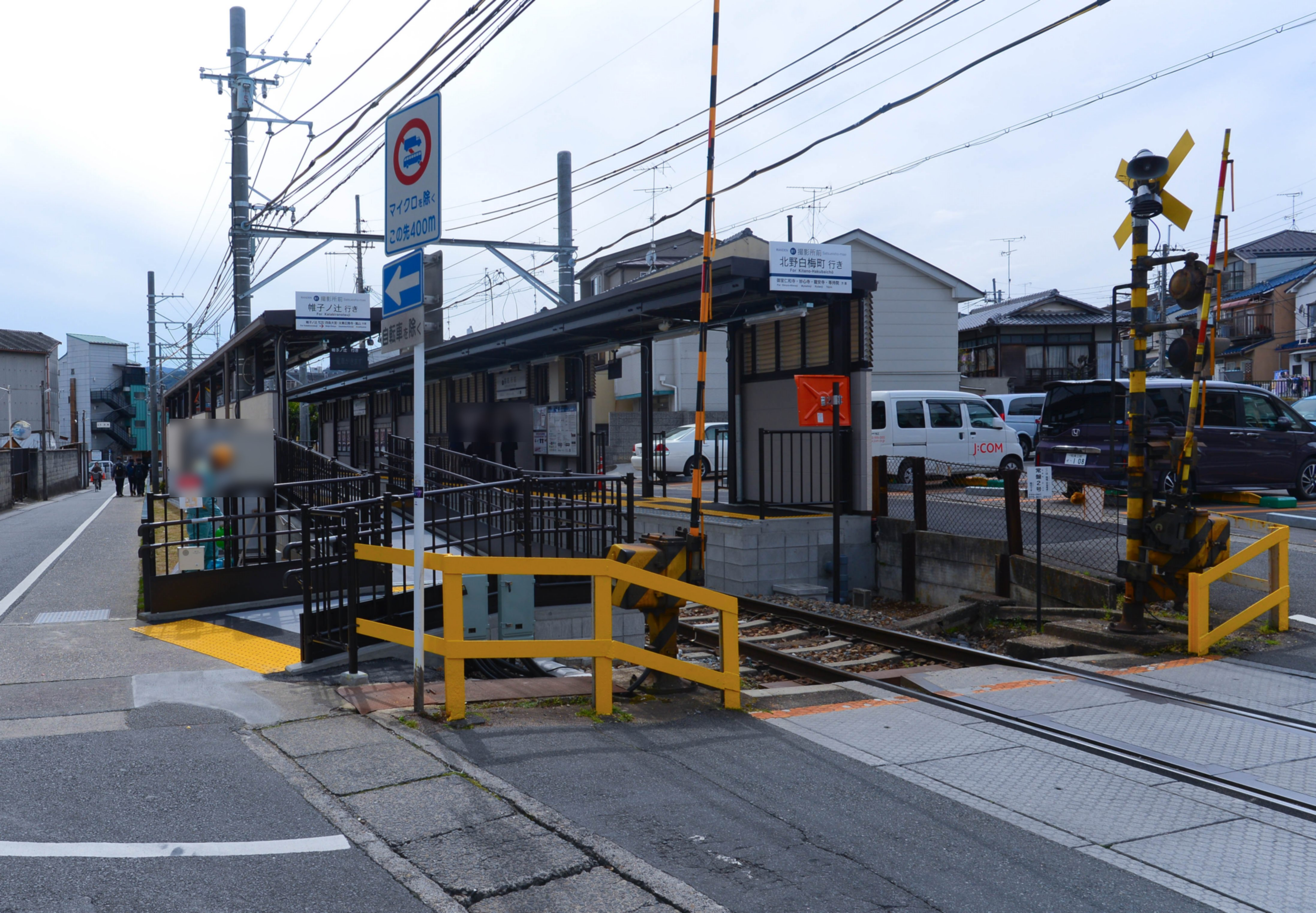 京福電鉄（嵐電）撮影所前駅全景